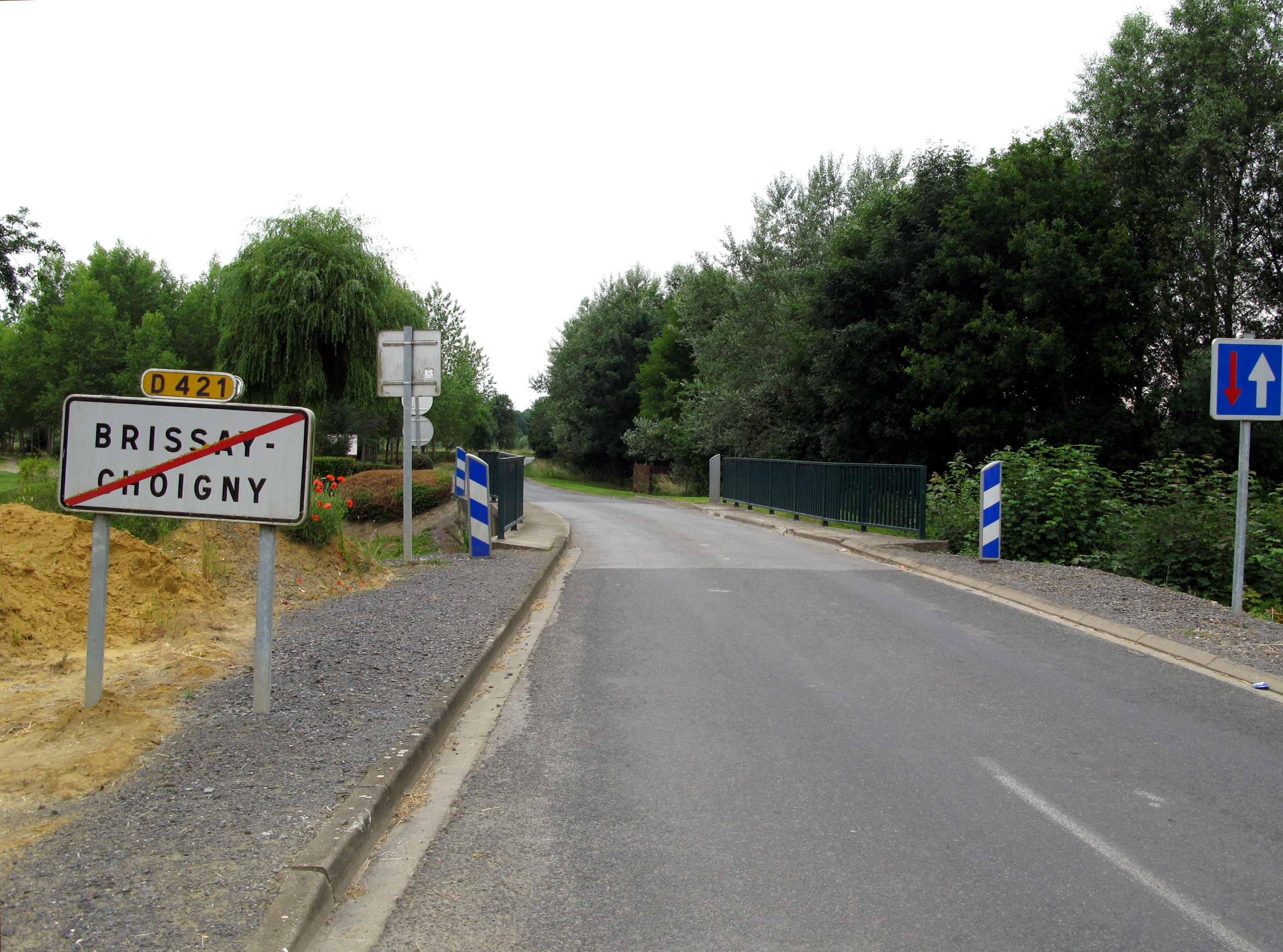 Brissay-Choigny (Aisne, France) - La sortie Ouest de la commune, avec le pont. . .